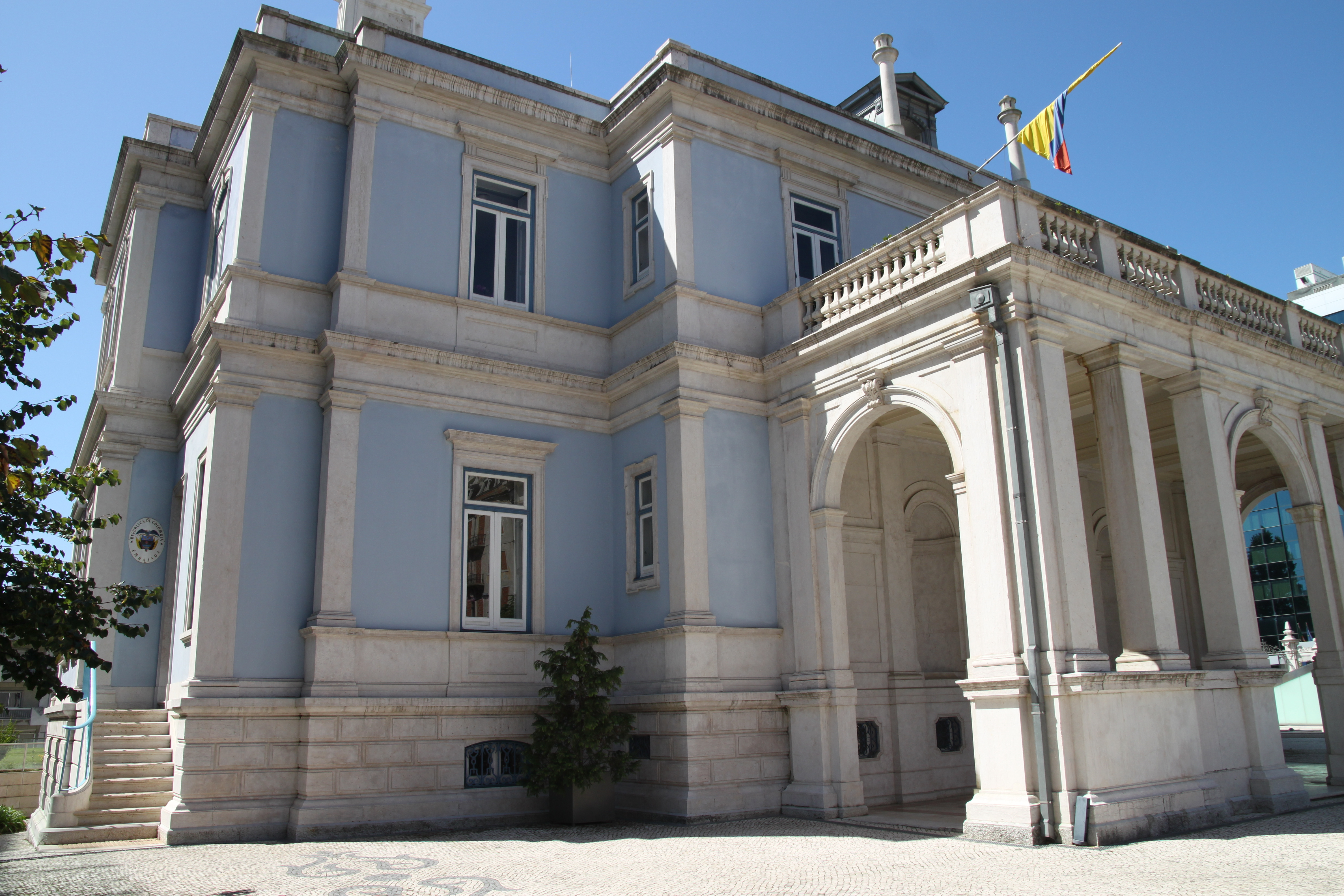 Palácio Sotto Mayor, anexos e logradouro This file was uploaded for Wiki Loves Monuments in Portugal with the unique identifier 71260.